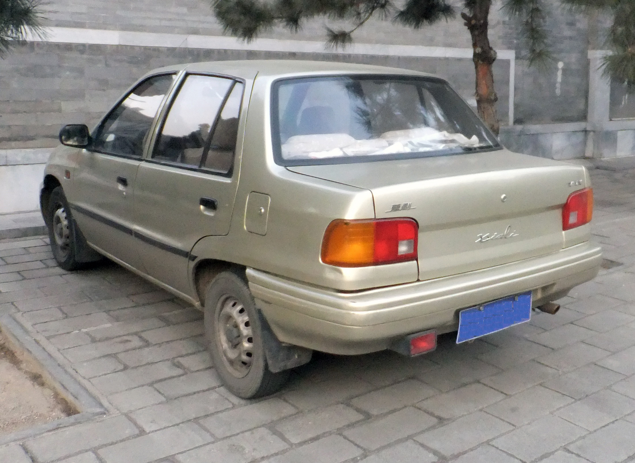 天津一汽夏利汽車 ヴィータ・N3